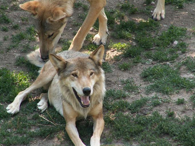 Canis lupus.